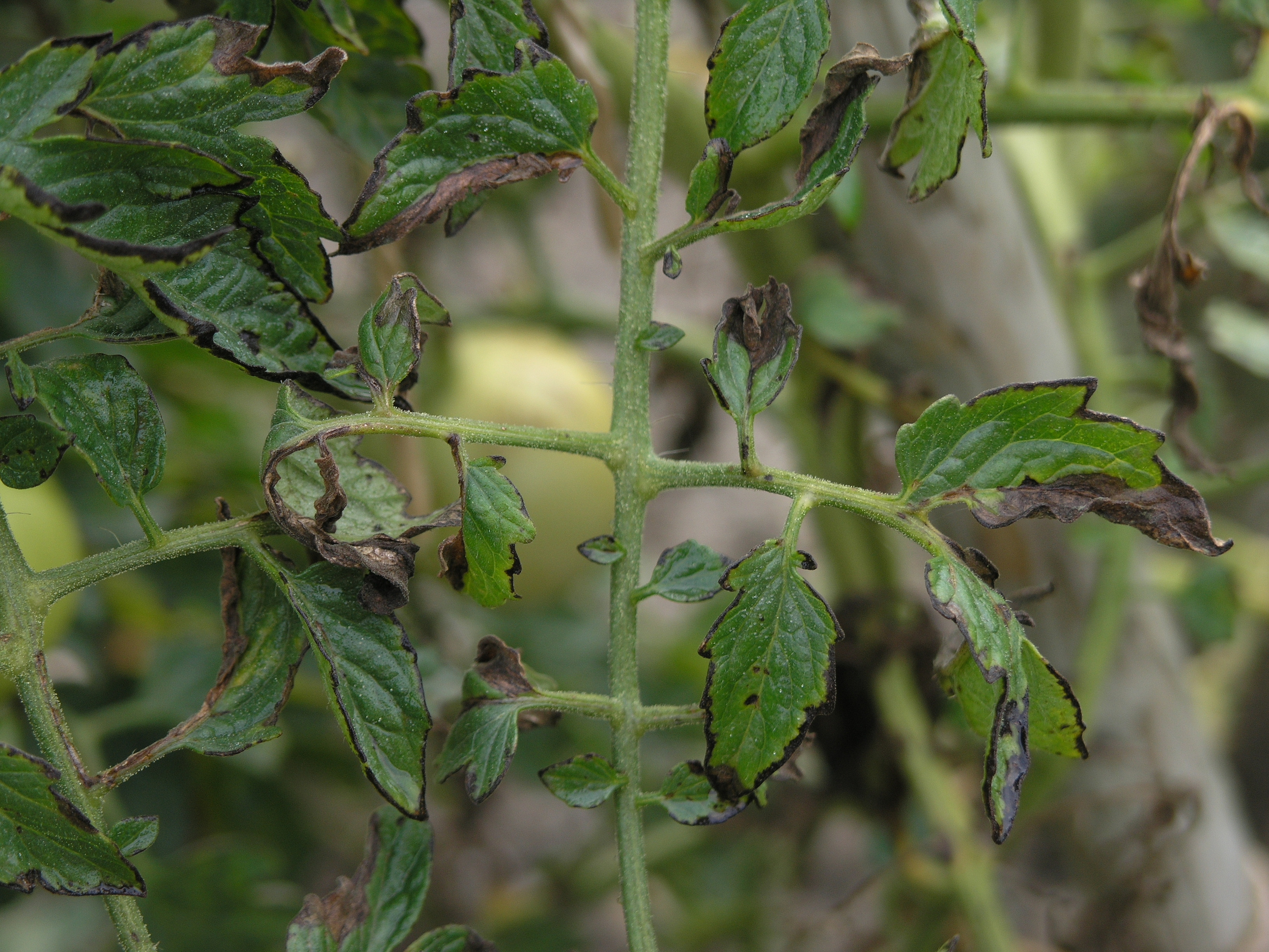 Blattränder und -flecken durch Pseudomonas syringae